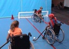 club esportiu guttmann